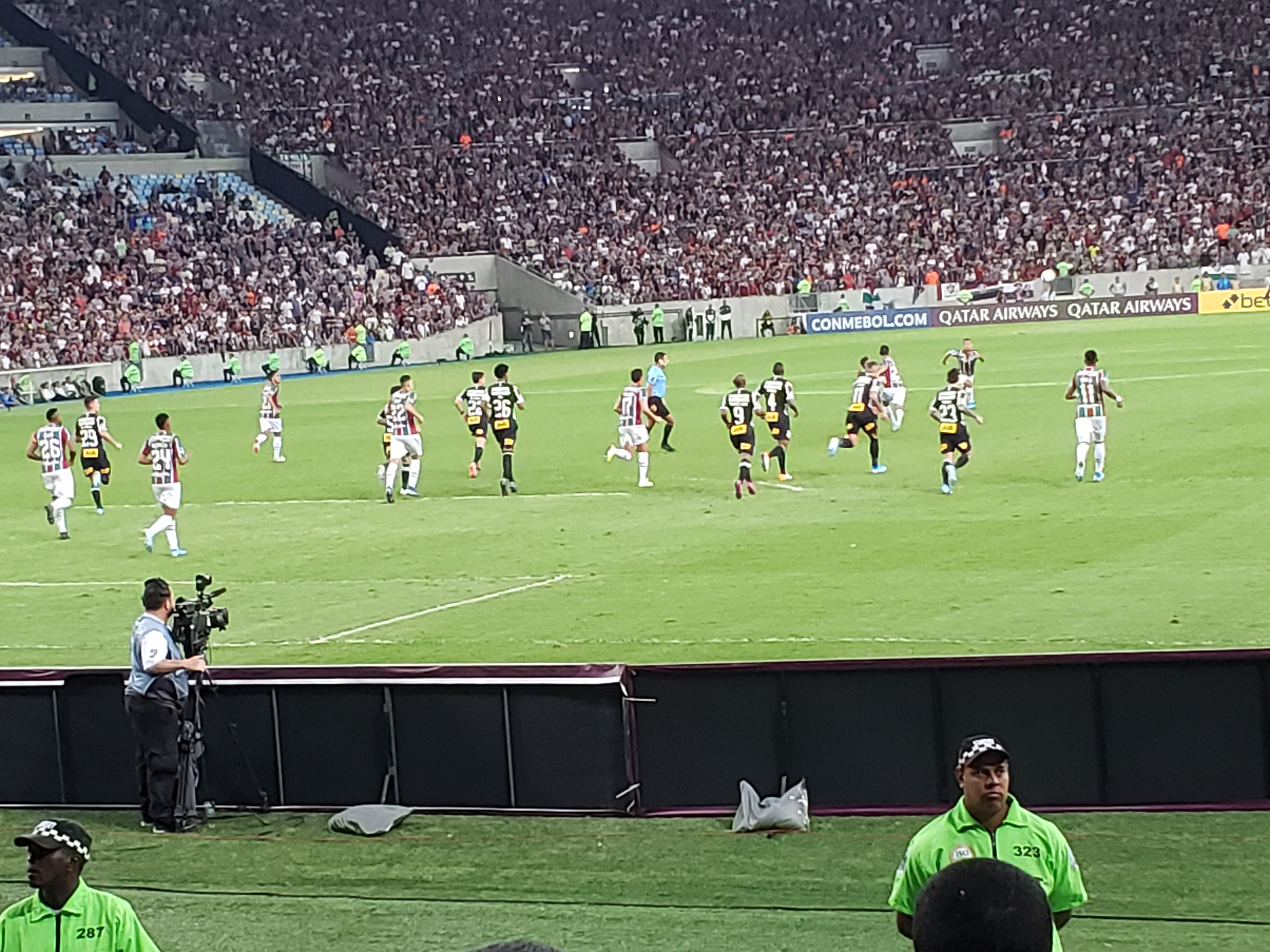 Fluminense Football Club contra o Corinthians na Copa Sul-Americana de 2019, partida disputada no Maracanã em 29/08/2019 e que terminou empatada por 1 a 1.